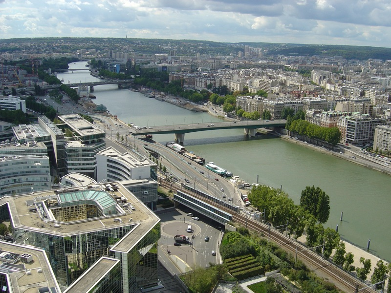 La Seine entre Paris (à gauche) et Boulogne-Billancourt (à droite). - La Seine d’amont vers l’aval, au niveau de Paris (premier plan), d'Issy-les-Moulineaux (rive gauche) et de Boulogne-Billancourt (rive droite, au fond) avec, au premier plan, le Pont du Garigliano qui relie le XVIe arrondissement (Rive droite) au XVe arrodisssement (Rive gauche), au second plan le Pont Aval sur lequel passe le Boulevard Périphérique (E 5). Le pont du fond est le Pont d'Issy qui relie Boulogne-Billancourt (Rive droite) à Issy-les-Moulineaux en passant sur la pointe amont de l’Île Saint-German. Les quais sont, sur la rive gauche le Quai d'Issy-les-Moulineaux (Paris) bordé par les rails et le pont ferroviaire de la ligne RER C , sur la rive droite le Quai Louis-Blériot (Paris), le Quai Saint-Exupéry (Paris) et le Quai du Point du Jour (Boulogne-Bilancourt). L’immeuble aux façades de verre du premier plan est celui de la Banque Populaie Rives de Paris, l'immeuble au plan rectangulaire situé derrière est celui de France Televisions sur l'Esplanade Henri-de-France. Photographie très vraisemblablement prise du ballon captif du Parc André Citroën.